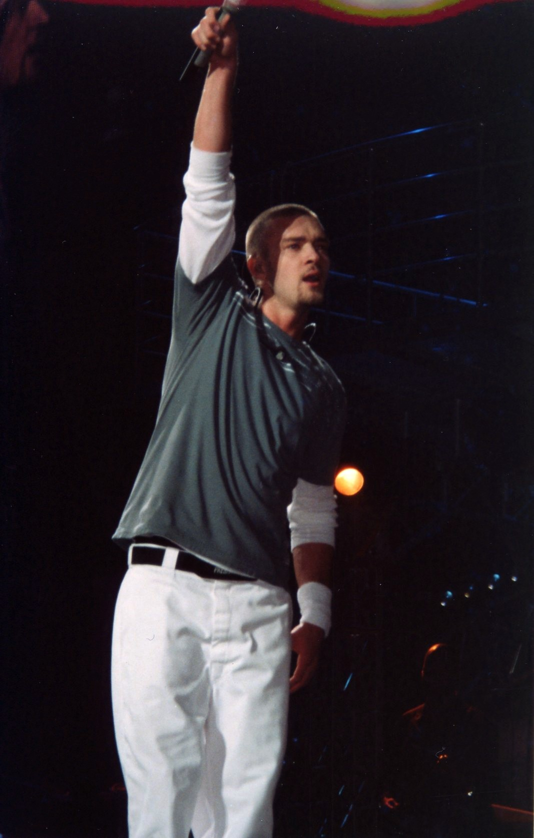 El cantante estadounidense Justin Timberlake dando un show en el Earls Court Exhibition Centre de Londres, Inglaterra, con motivo de su gira musical Justified World Tour en 2003-2004.